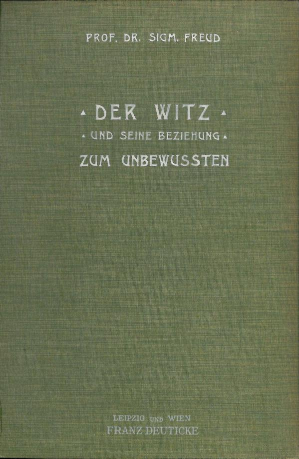 Cover of Freud, Der Witz, 1905